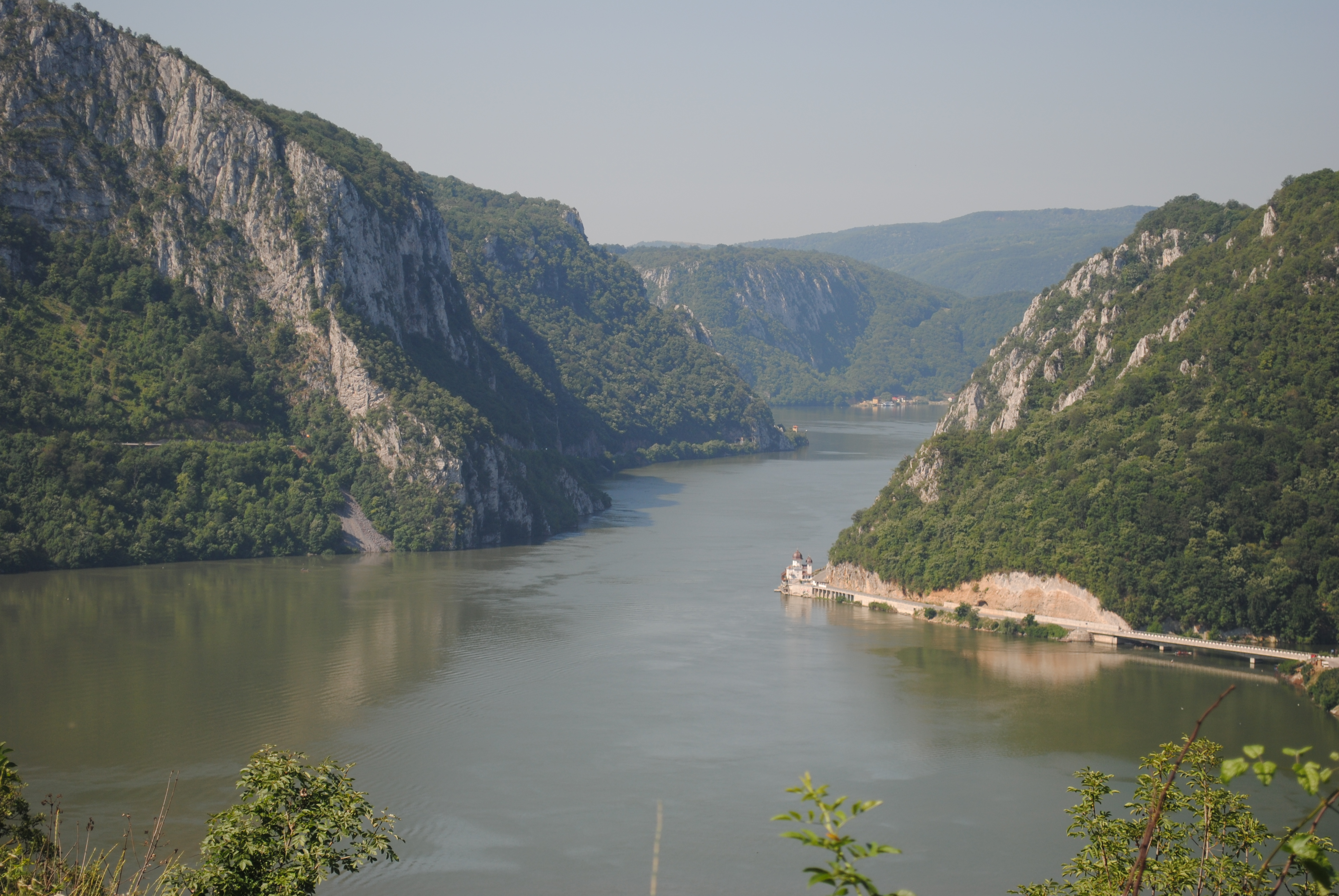 Djerdapska klisura